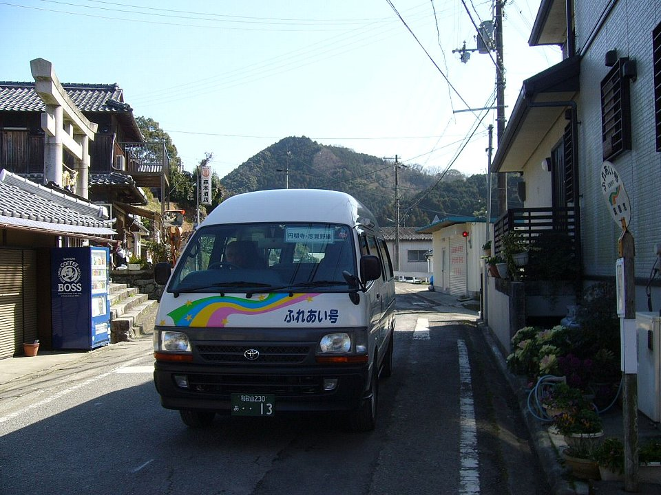 ふれあい号（和歌山県紀美野町） 真国宮バス停にて